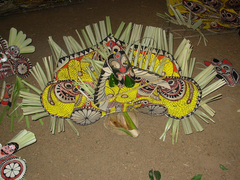 പടയണിയിലെ കോലങ്ങൾ ക്ഷേത്രമുറ്റത്ത് പ്രദർശിപ്പിച്ചിരിക്കുന്നു